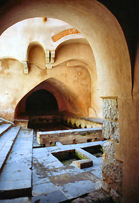 Particolare dell'antico lavatoio di Cefalù